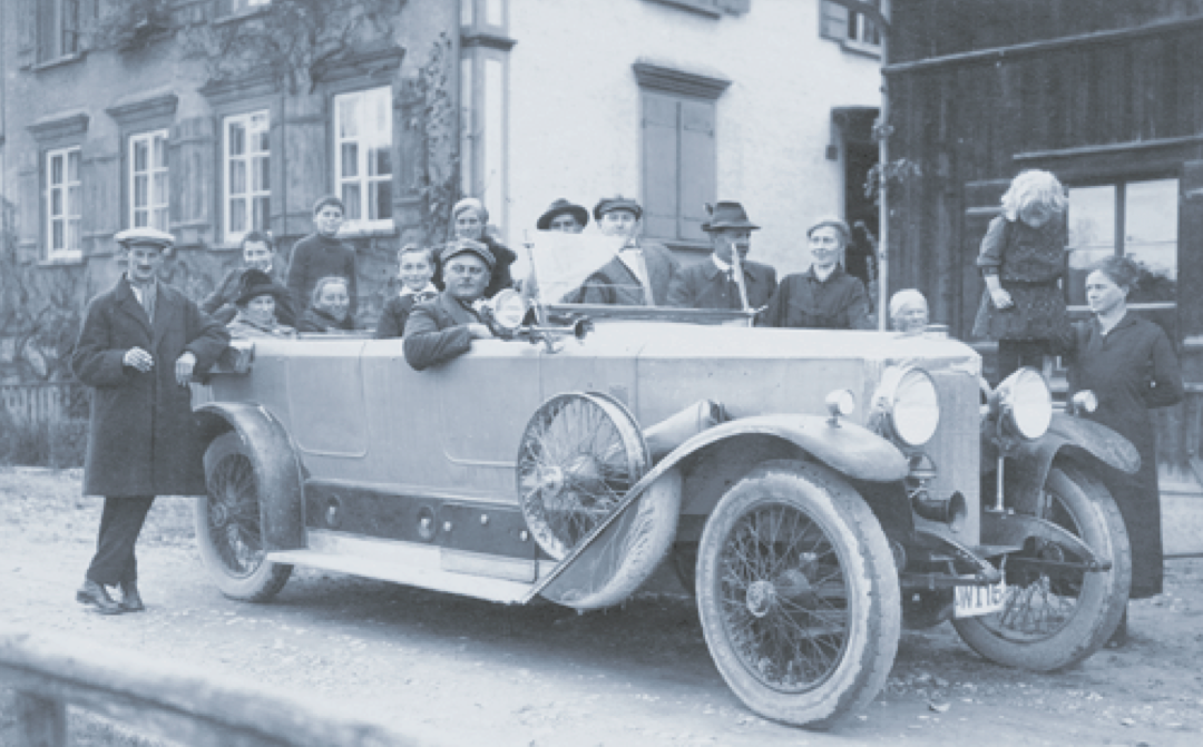 Taxi in Partenen. Am Steuer Engelbert Netzer, der erste Berufschauffeur im Montafon.